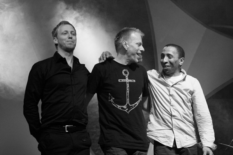 Tingvall Trio auf dem Jazzfestival St. Ingbert 2010